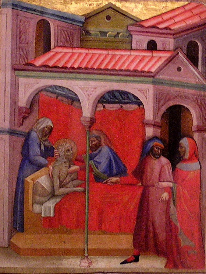 Sono io l'autore della foto. Rappresenta una tempera su tavola di Olivuccio di Ciccarello conservata nella Pinacoteca Vaticana. Fa parte della serie delle Opere di misericordia ed è intitolata: "Dare conforto agli ammalati". Era precedentemente attribuita a Carlo da Camerino. La foto non è purtroppo di buona qualità. Se ne avete una migliore sostituitela (nella Pinacoteca Vaticana è consentito fotografare le opere esposte)--Gep (msg) 18:24, 18 feb 2012 (CET).